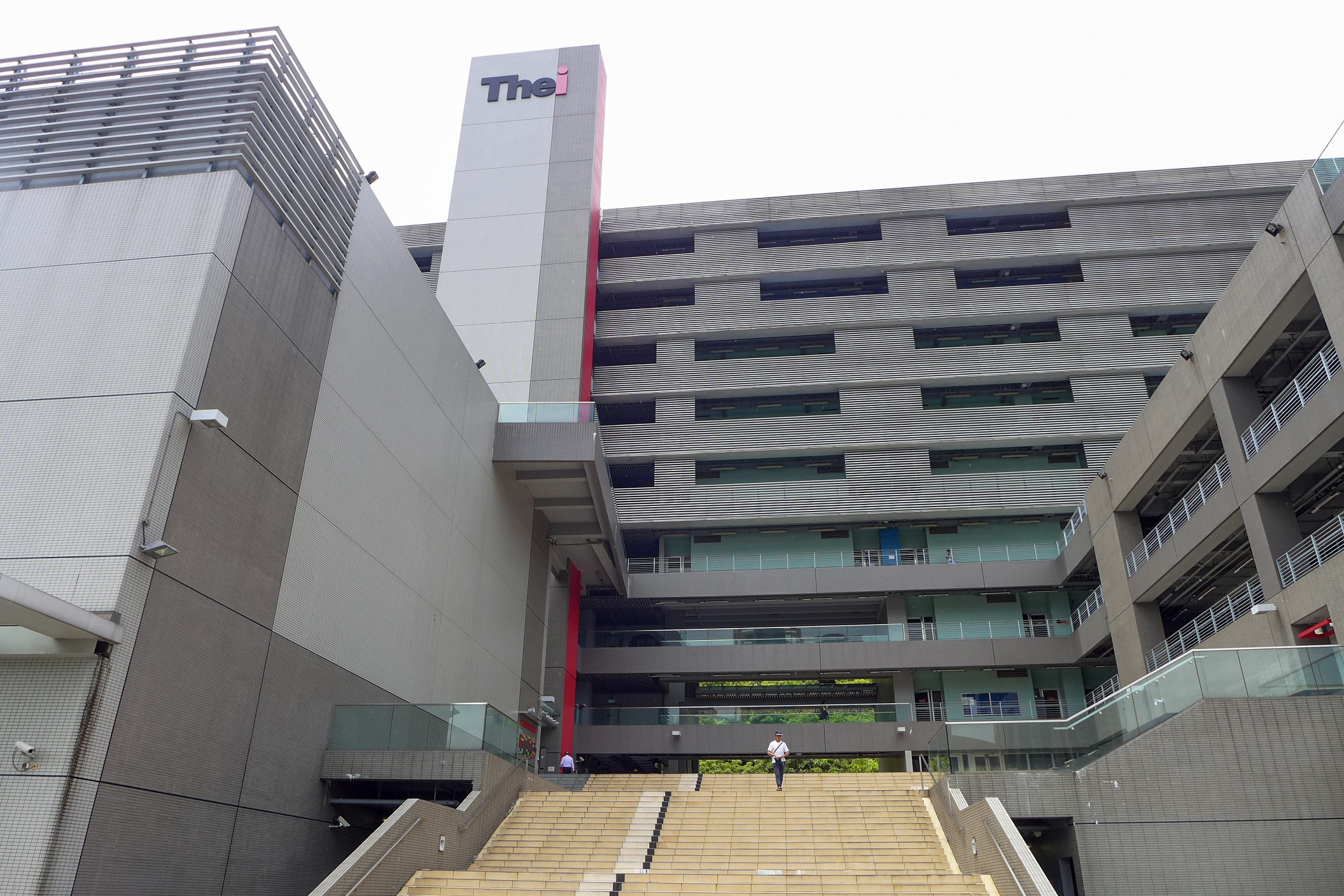 THEi Tsing Yi campus